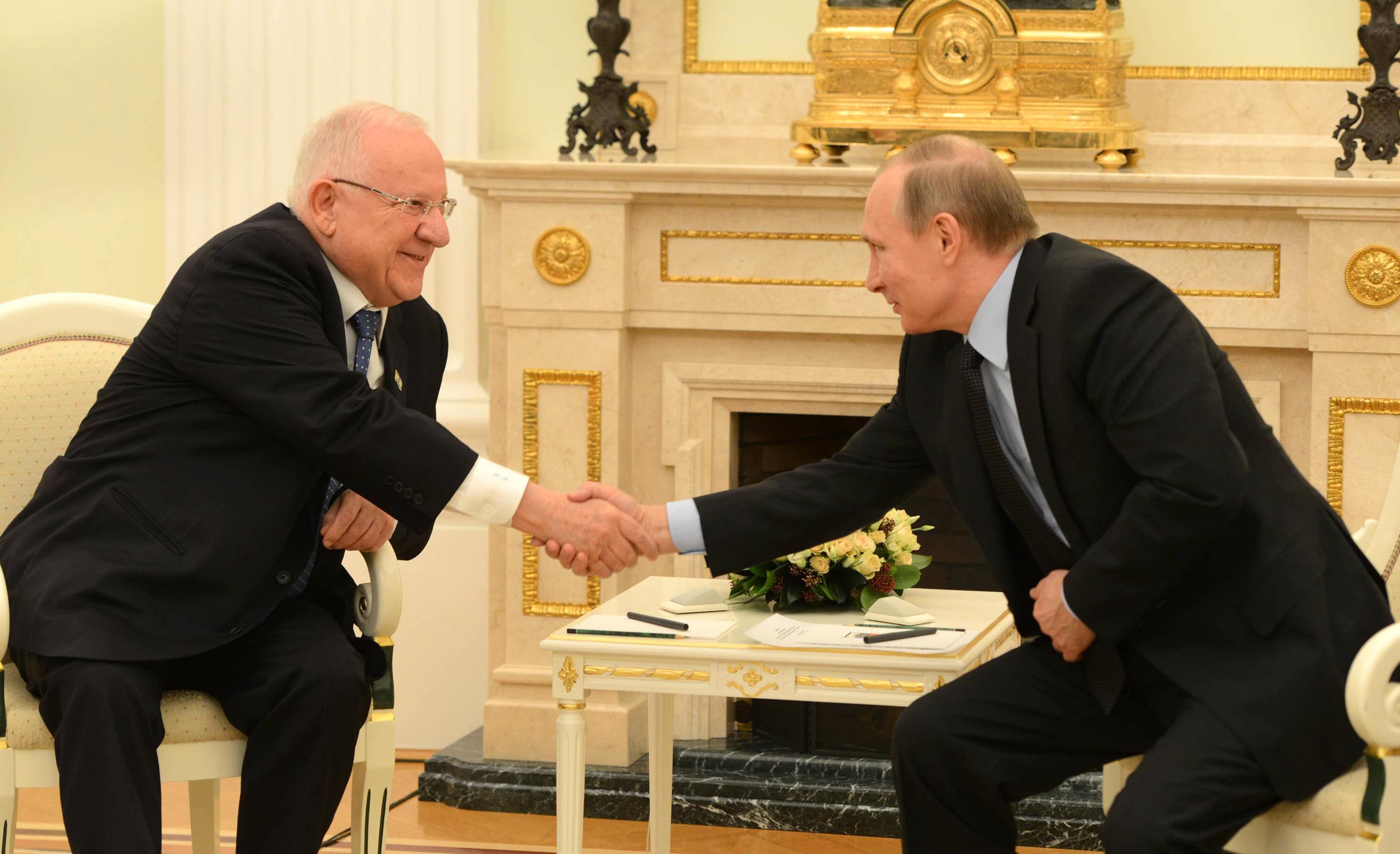 נשיא מדינת ישראל ראובן ריבלין בפגישה עם נשיא רוסיה, ולדימיר פוטין, בקרמלין במוסקבה.